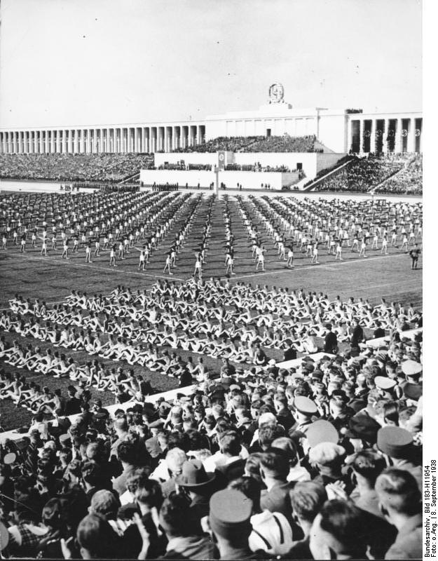 Nürnberg, Reichsparteitag, Turnvorführung Reichsparteitag Grossdeutschland. 8.9. "Tag der Gemeinschaft" der NS-Kampfspiele a[uf]. d[er] Zeppelinwiese. Die Zeppelinwiese während der Massen-Freiübungen. 8.9.1938